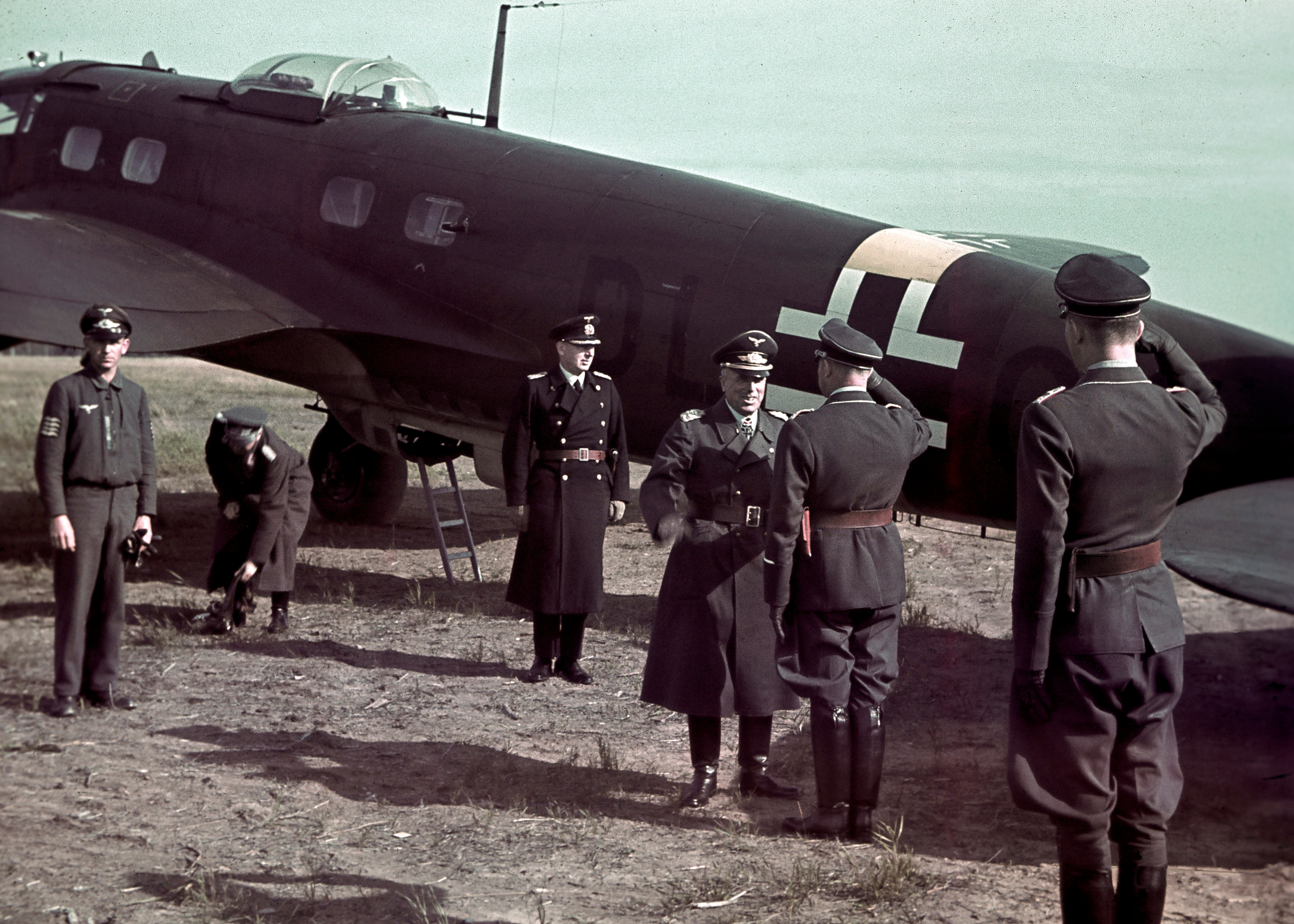 Luftflotte 1:n komentaja, kenraalieversti Alfred Keller saapuu Mensuvaaran lentokentälle tarkastamaan saksalaisten tykkilauttoja. Takana Heinkel He-111 lentokone. Mensuvaara (SA-Kuva JSdia160)